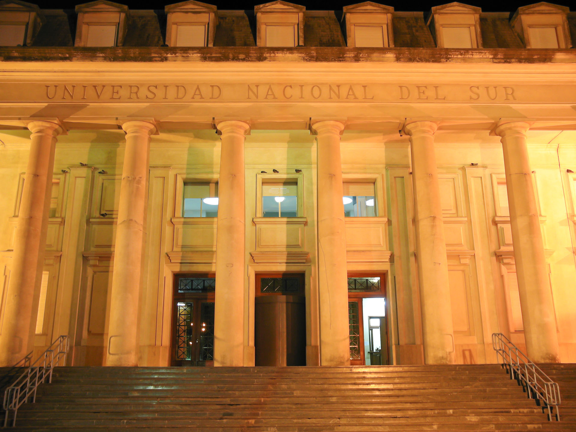 Fotografía de la fachada de la Universidad Nacional del Sur.